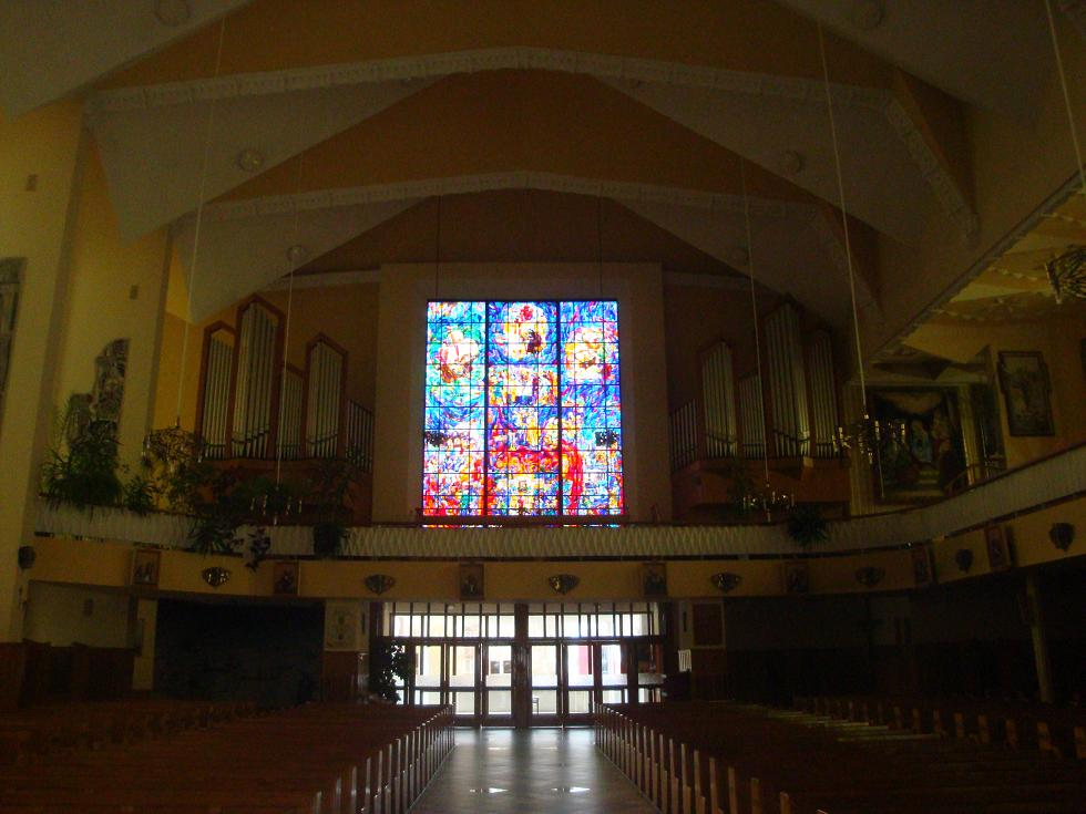 Kościół Matki Bożej Nieustającej Pomocy w Tarnobrzegu-Serbinowie